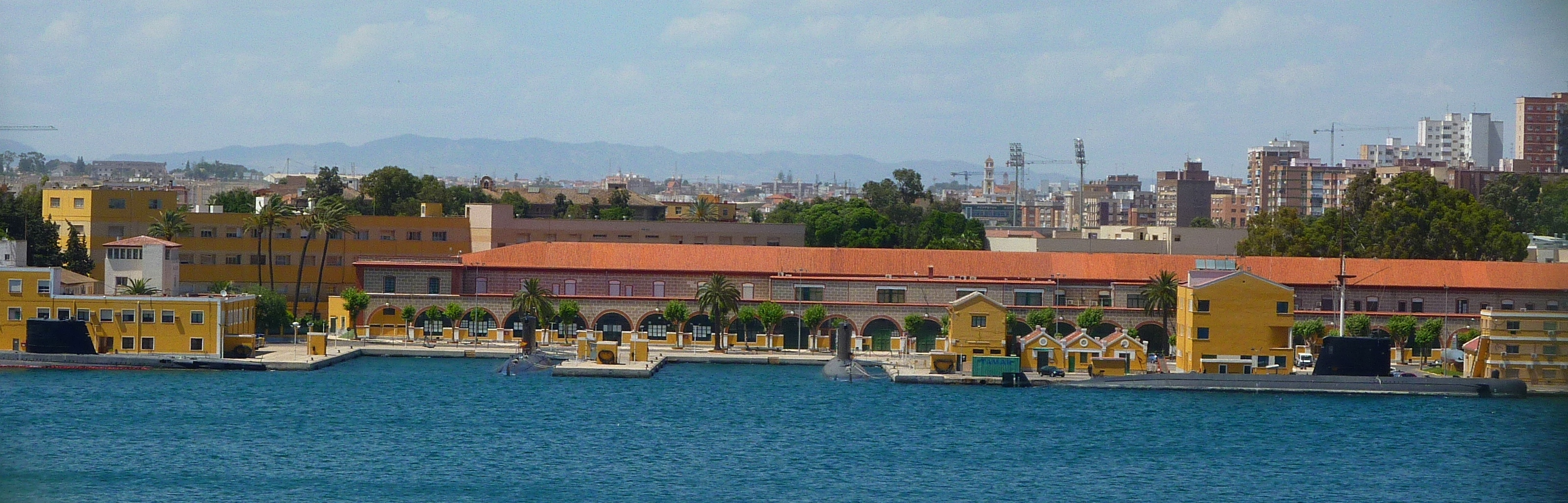 Los 4 submarinos de la clase Galerna en la base de Cartagena.